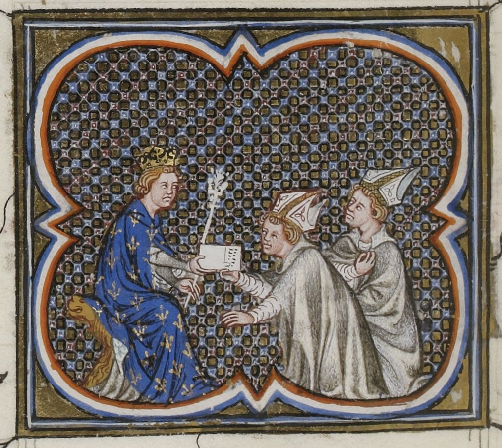 Philippe Auguste recevant des messagers du pape l'appelant à la croisade. Enluminure des Grandes Chroniques de France, XIVe siècle. Paris, Bibliothèque nationale de France, Département des manuscrits, Français 2813, folio 227 verso.